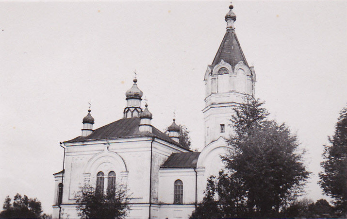 Беларуская (тарашкевіца): Вязавец (Viazaviec). Царква-мураўёўка